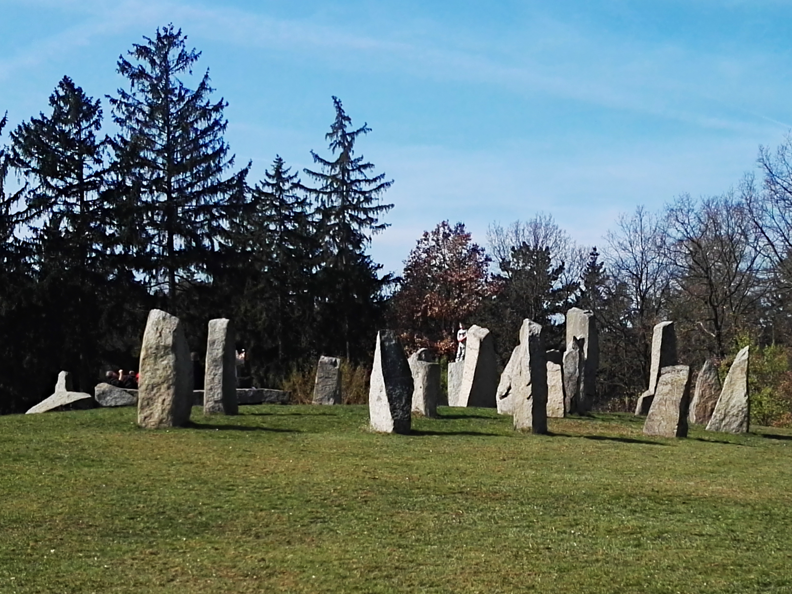 Skupina vztyčených kamenů v průhonické Dendrologické zahradě